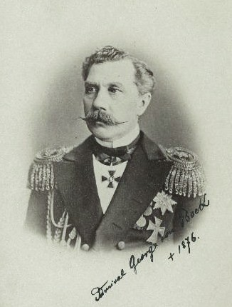 Георгий Тимофеевич Бок (1818 — 1876)